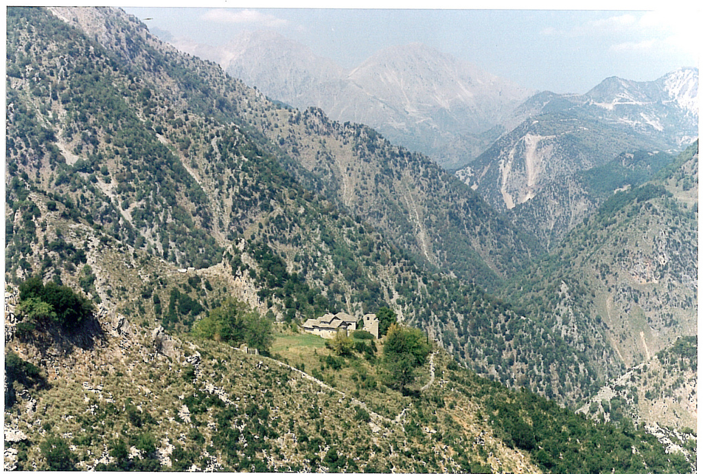 Πηγές Αρτας, όρος Κόκκινα Στεφάνια, Χαράδρα Αχελώου. Η ιστορική Μονή όπου δόθηκε η περίφημη μάχη του Αλή Πασά με τους Σουλιώτες τον Απρίλη του 1804.